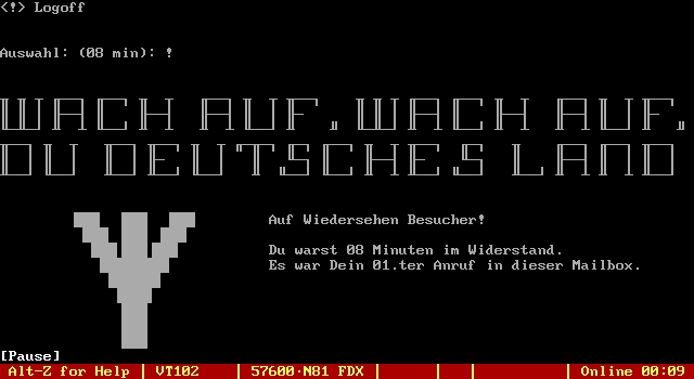 Screenshot aus einer Mailbox des Thule-Netzes, Rune Elhaz